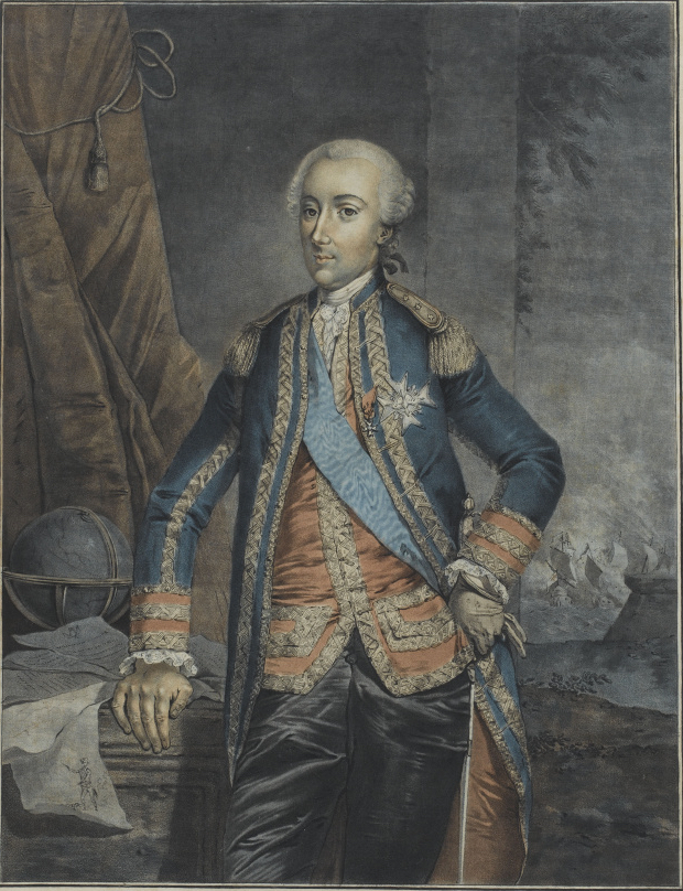 Portrait du Comte d'Estaing